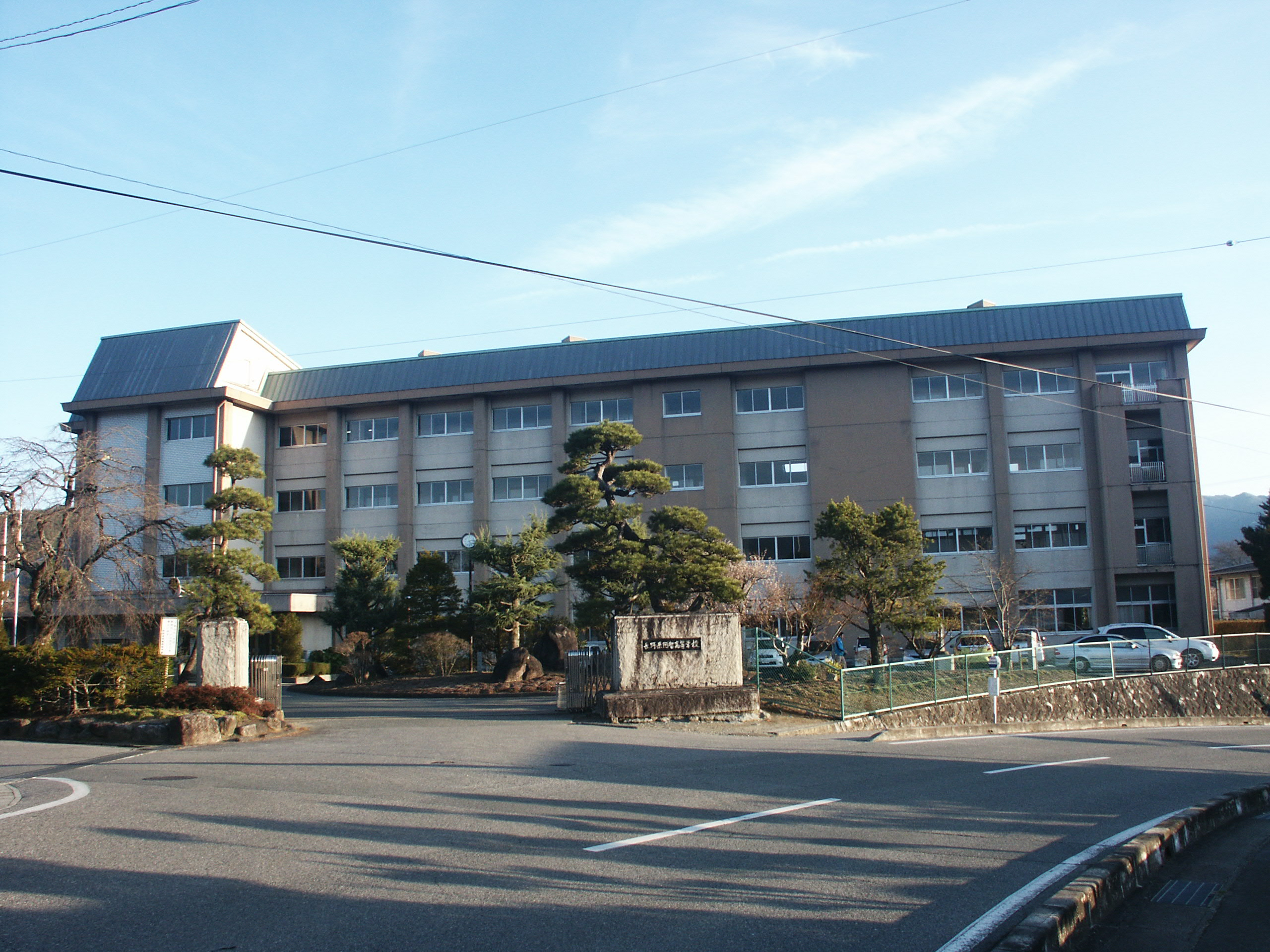 長野県阿智高等学校校舎